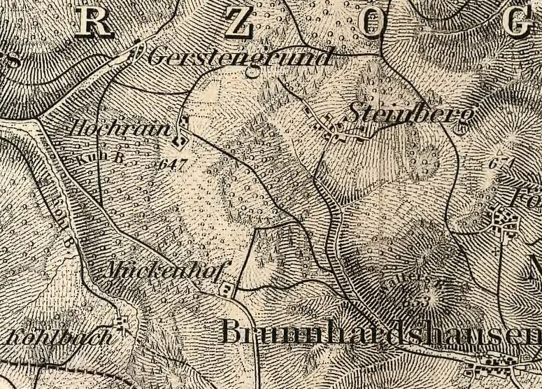 KDR 1893 Thüringische Rhön Wüstungen Mückenhof Hochrain